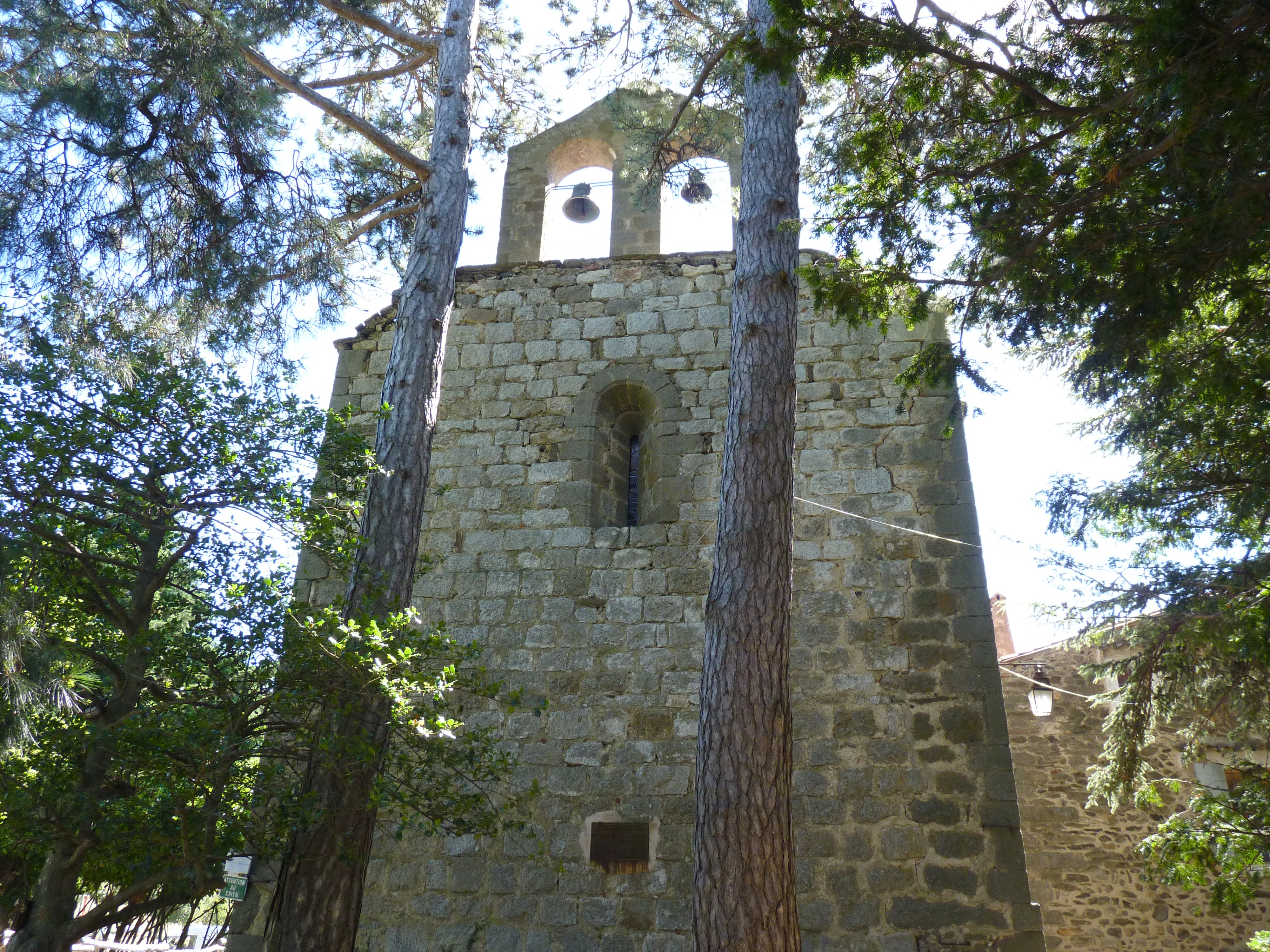 Église de Saint-Martin d'Albère, L'Albère (Pyrénées-Orientales, Languedoc-Roussillon, France)